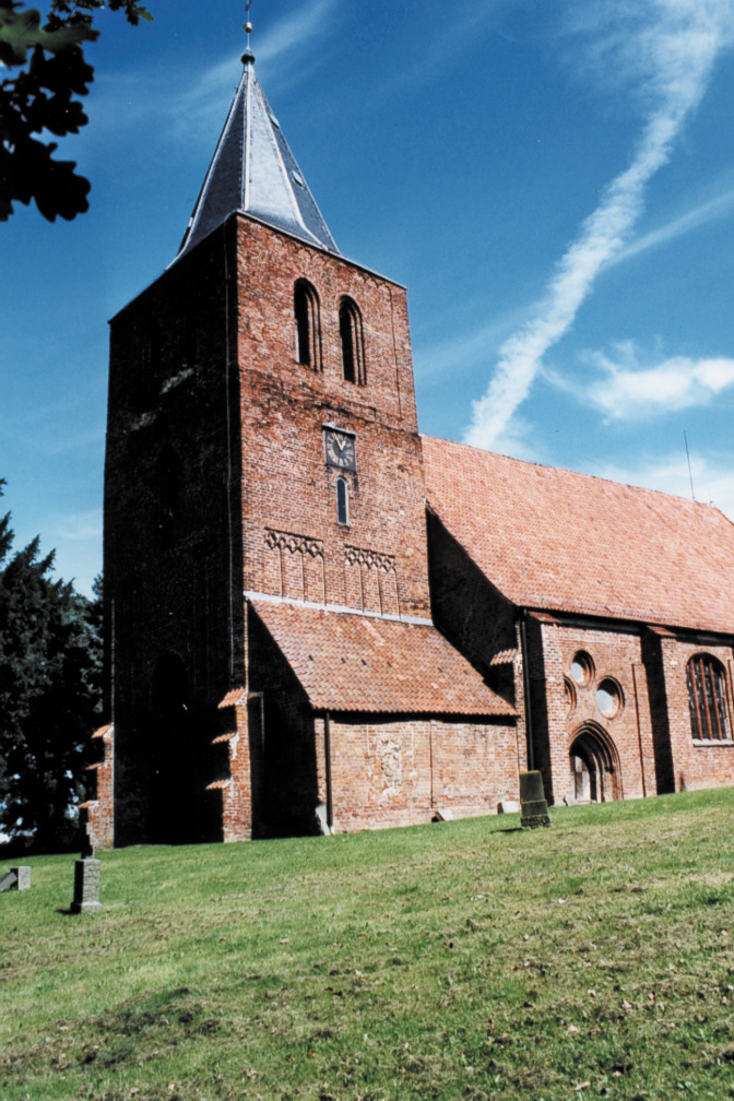 Dorfkirche in Kalkhorst, von Südost (Mecklenburg-Vorpommern)